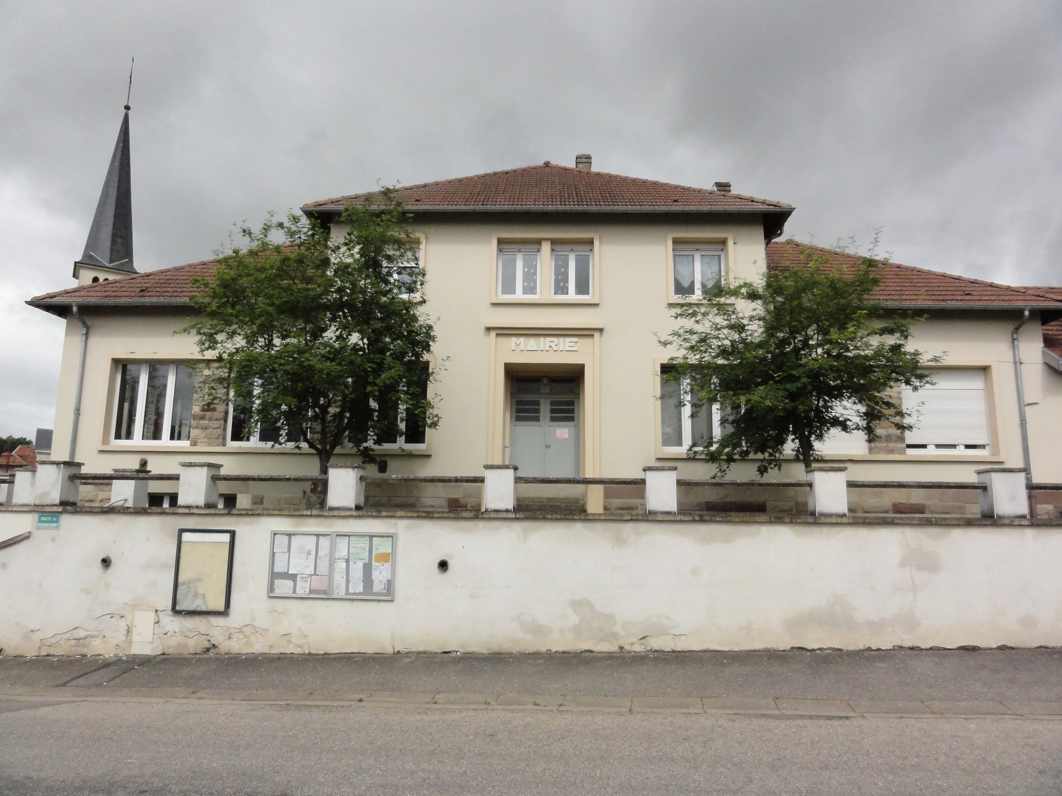 Bures (M-et-M) mairie